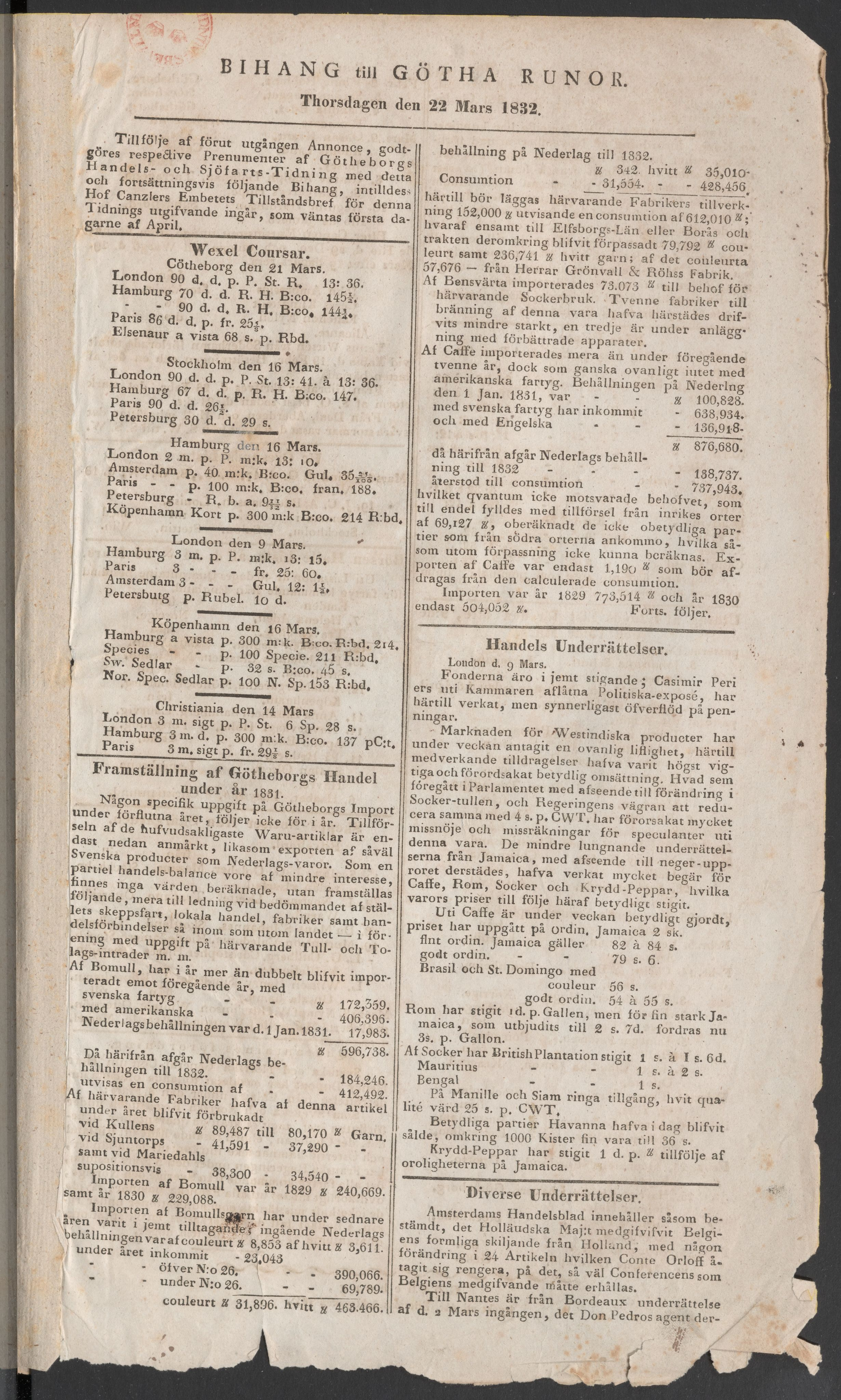 Bihang till Götha Runor 22 mars 1832. Göteborgs Handels- och Sjöfartstidning publicerades inledningsvis under detta namn.